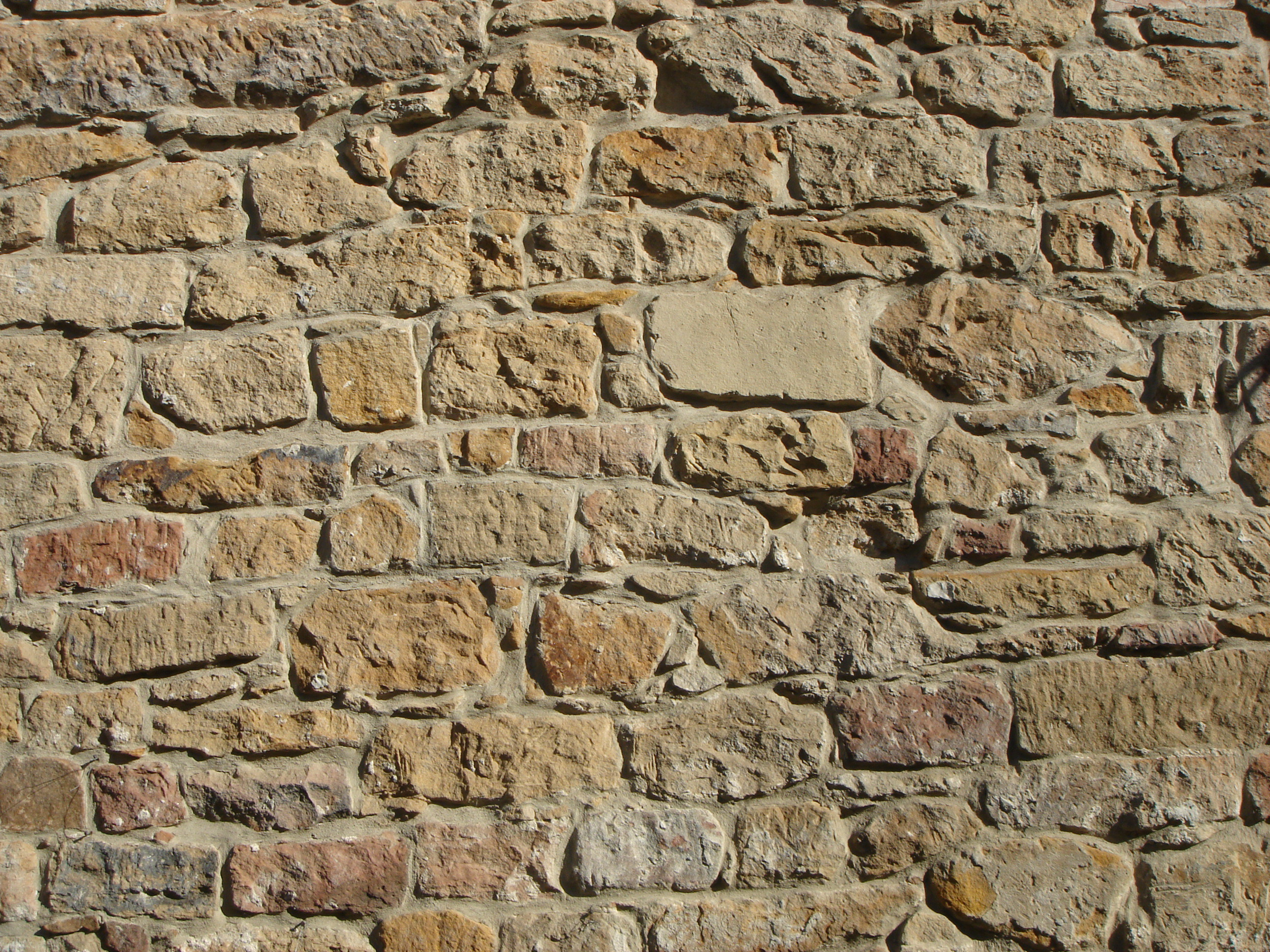 Bruchsteinmauerwerk